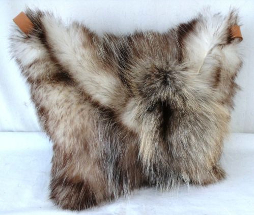 Tasche aus Amerikanischem Opossumfell